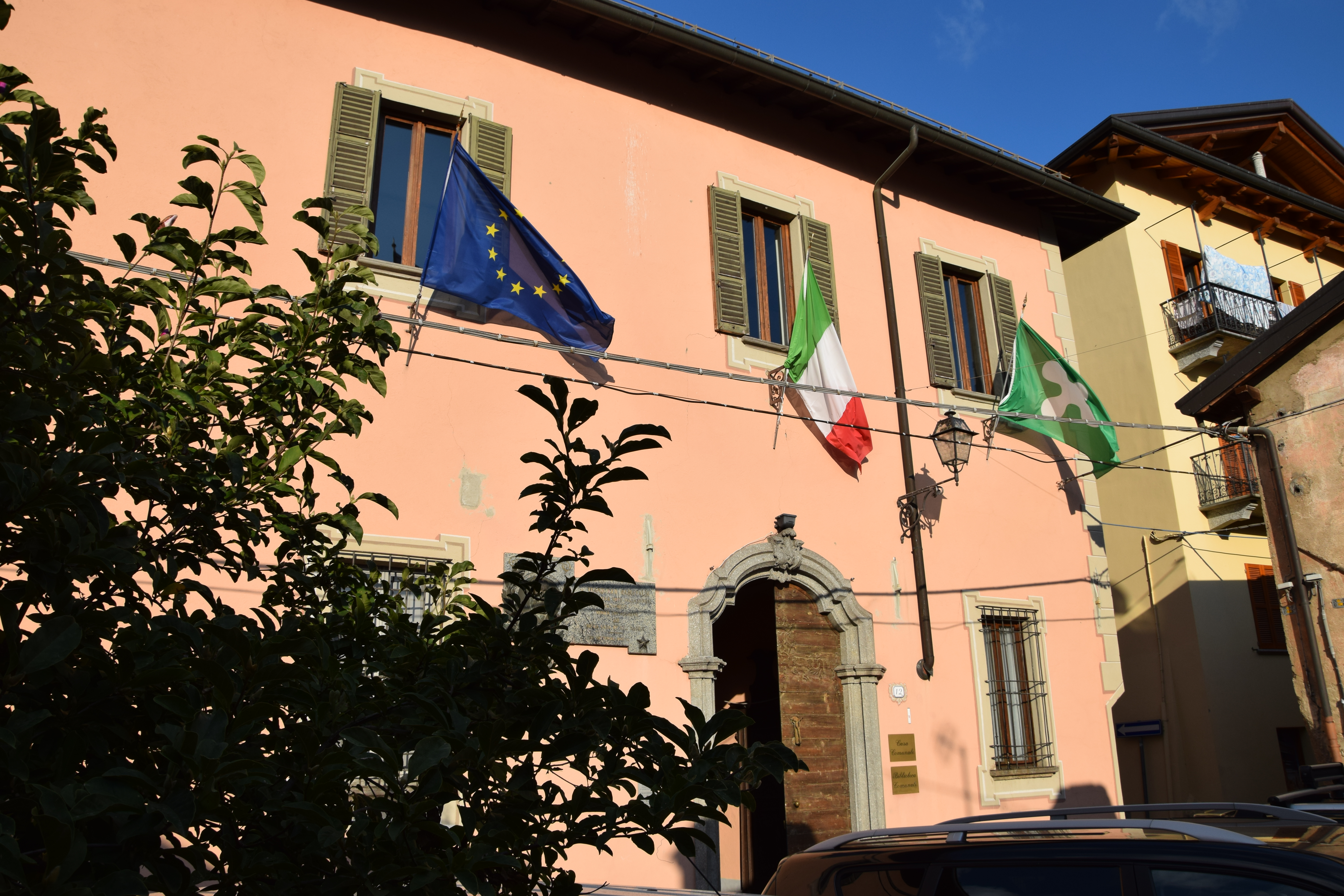 Palazzo Manzoni This is a photo of a monument which is part of cultural heritage of Italy.